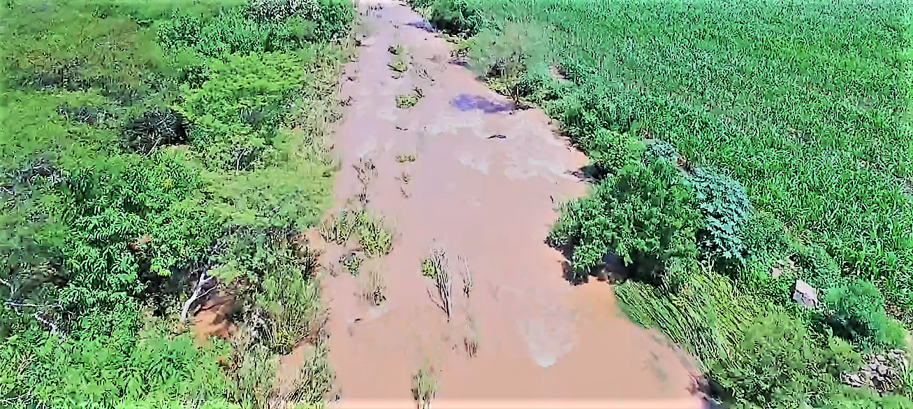 Cursos de agua Churintzio